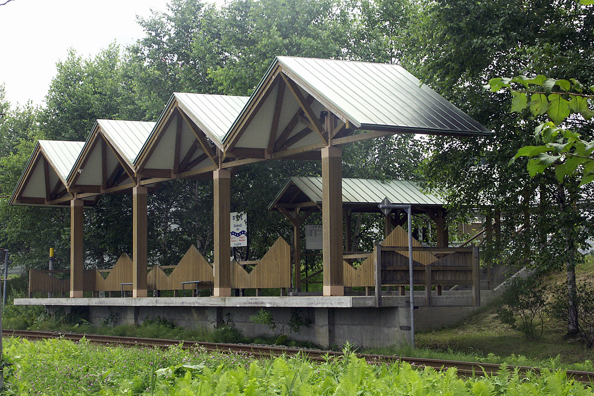 北海道ちほく高原鉄道ふるさと銀河線・岡女堂駅